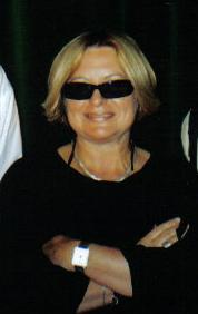 Magdalena Łazarkiewicz - polska reżyser filmowa